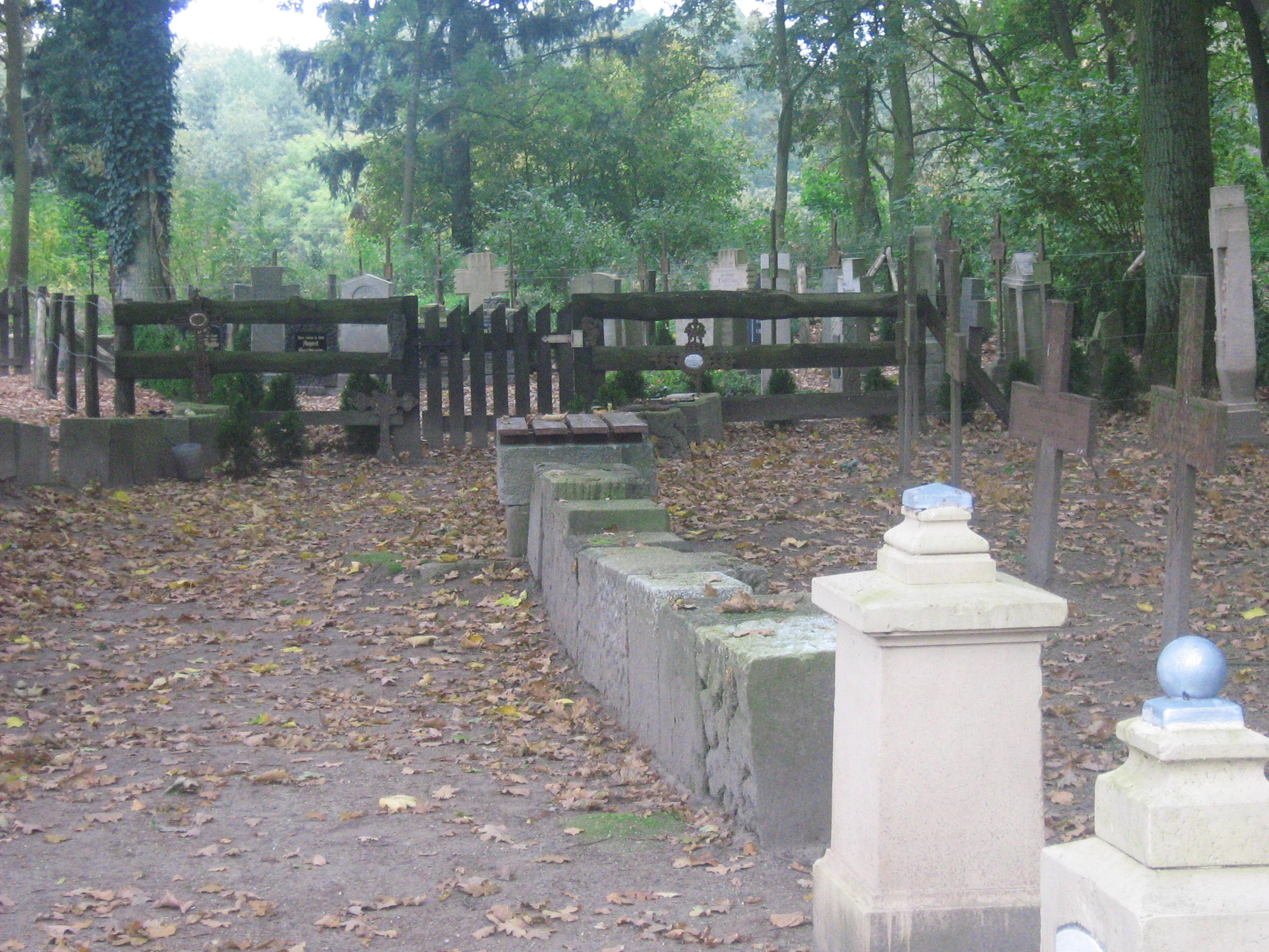 Lapidarium w Mechowie